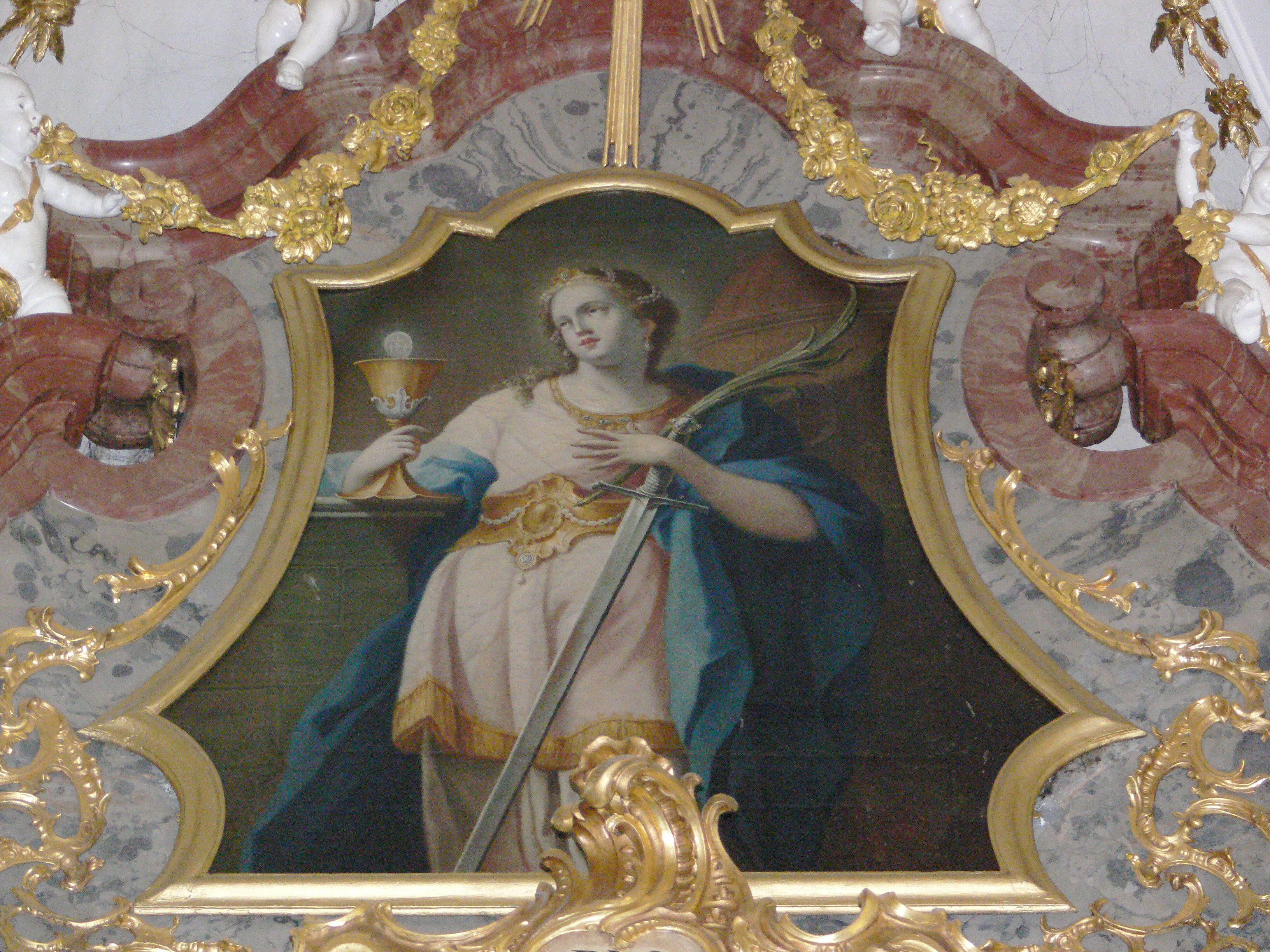 Pfarrkirche St. Ulrich, St. Ulrich im Schwarzwald, Gemeinde Bollschweil Hochaltar (Schreiner: Fr. Moosbrugger aus Bregenz, Fassmaler: A. Kummer aus Wurzach), 1748-1750; Auszug: Hl. Barbara von Benedikt Gams, 1751